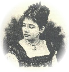 A escritora brasileira Maria Benedita Bormann (1853-1893).